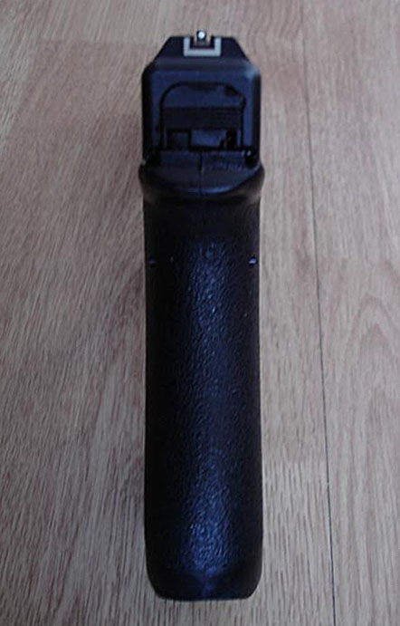 Glock 17 9mmPara (erste Ausführung - Februar 1986)